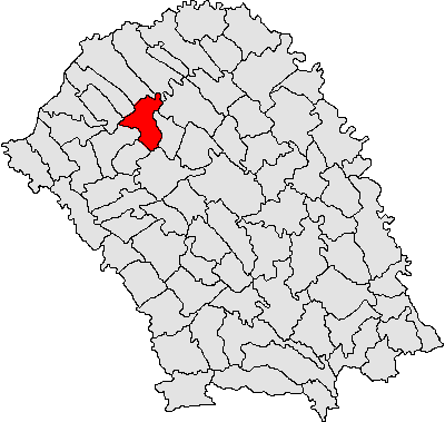 Categorie:Hărţi ale judeţului Botoşani